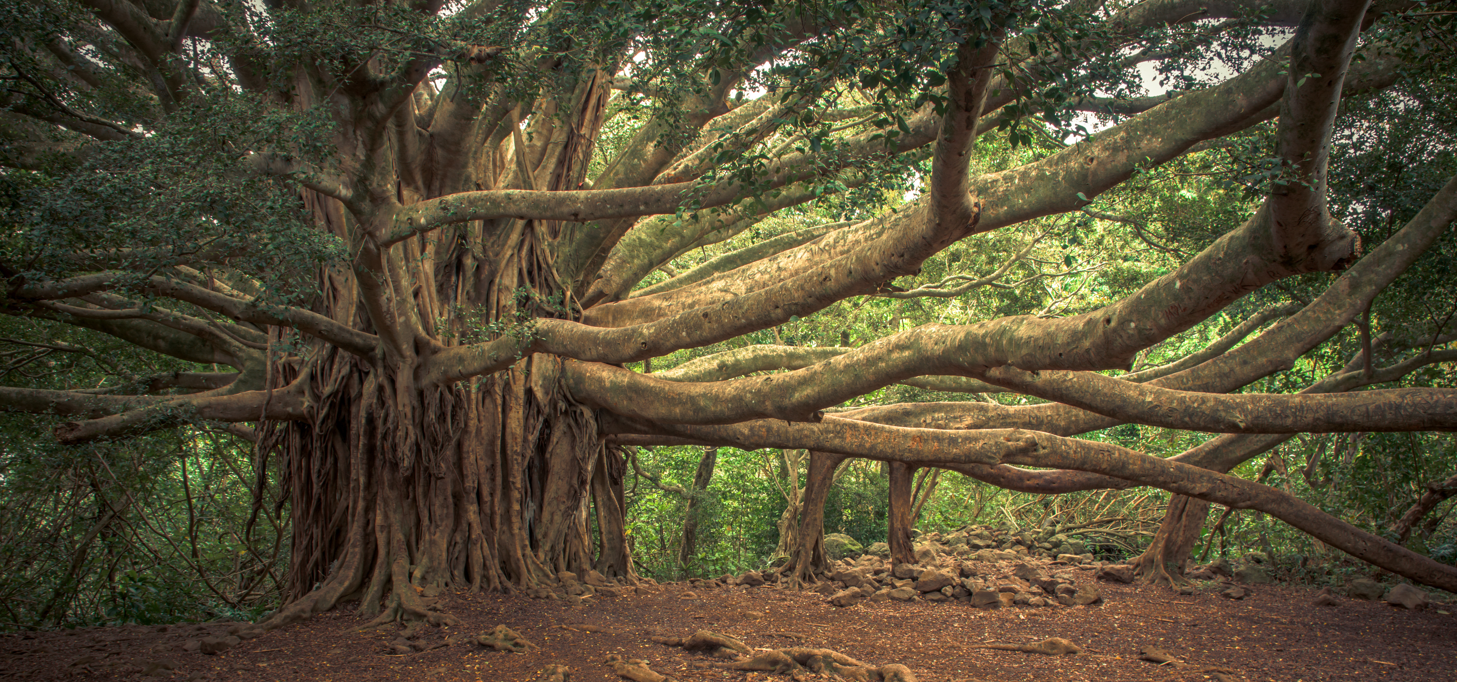 Haleakala National Park, Maui, Hawaii